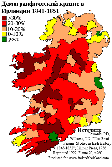 Демографический кризис в Ирландии в 1841-1851 гг., как последствие Великого голода